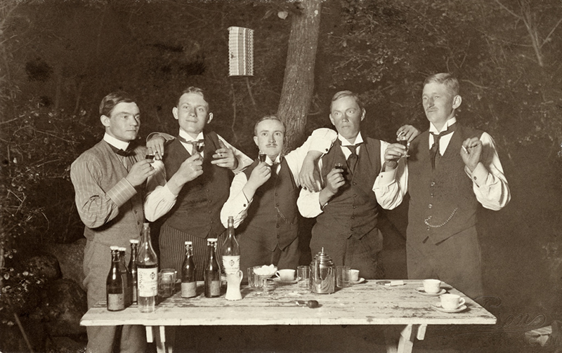 Fem män höjer sina snapsglas ute i en trädgård stående vid ett trädgårdsbord med kaffekoppar och flaskor.